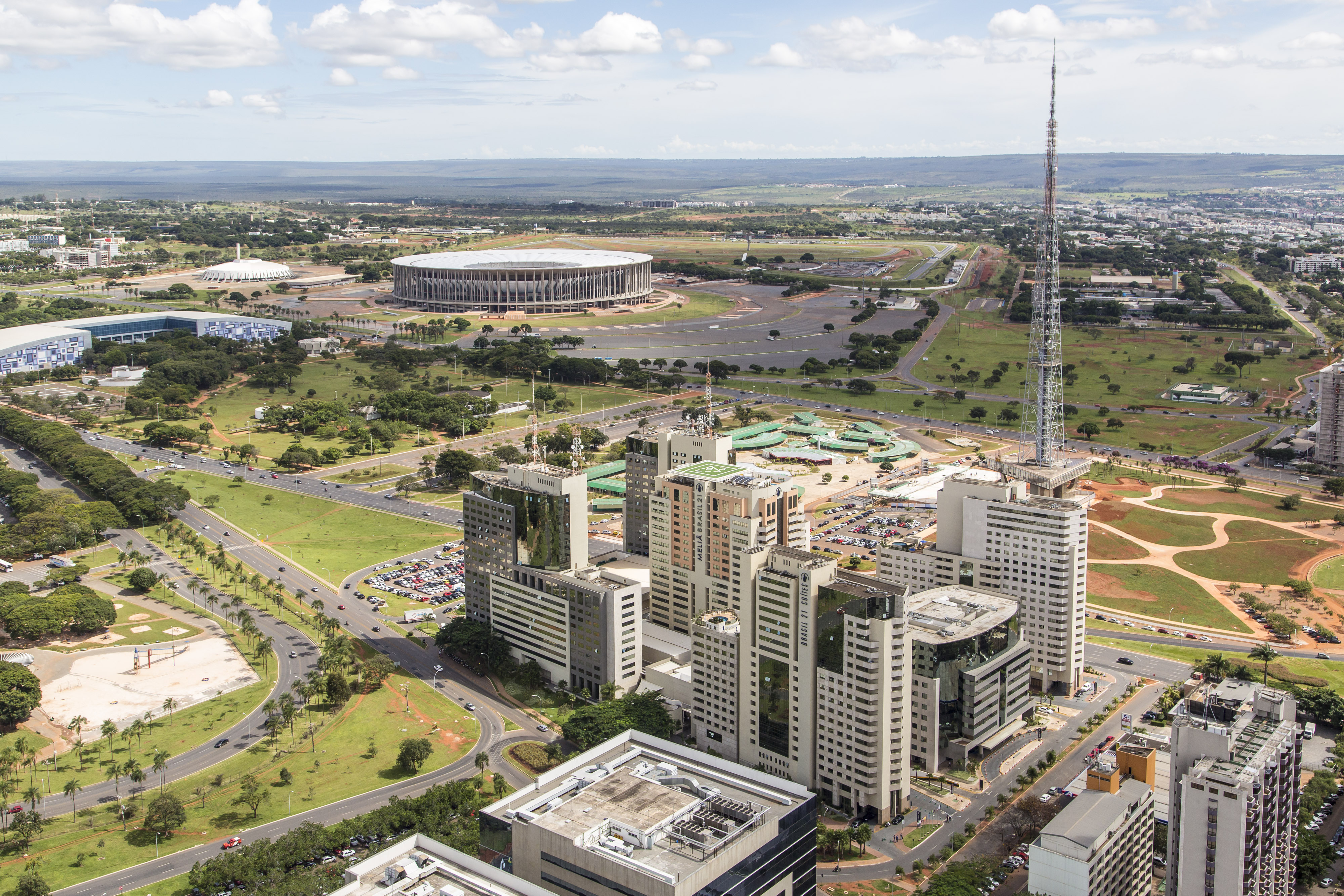 Setor hoteleiro, Brasília, Brasil